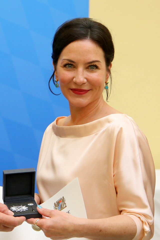 Marisa Burger, deutsche Schauspielerin und Sprecherin in Hörbüchern. Hier am 19. Juni 2017 im Bayerischen Innenministerium, nachdem sie für langjährige und nachhaltige Verdienste um die innere Sicherheit in Bayern mit dem "Stern der Sicherheit" (Bayerische Staatsmedaille Innere Sicherheit) ausgezeichnet wurde.Titel des Werks: "Marisa Burger, deutsche Schauspielerin, am 19.07.2017 im Bayerischen Innenministerium".